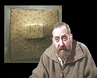 Portrait de Léopold Novoa